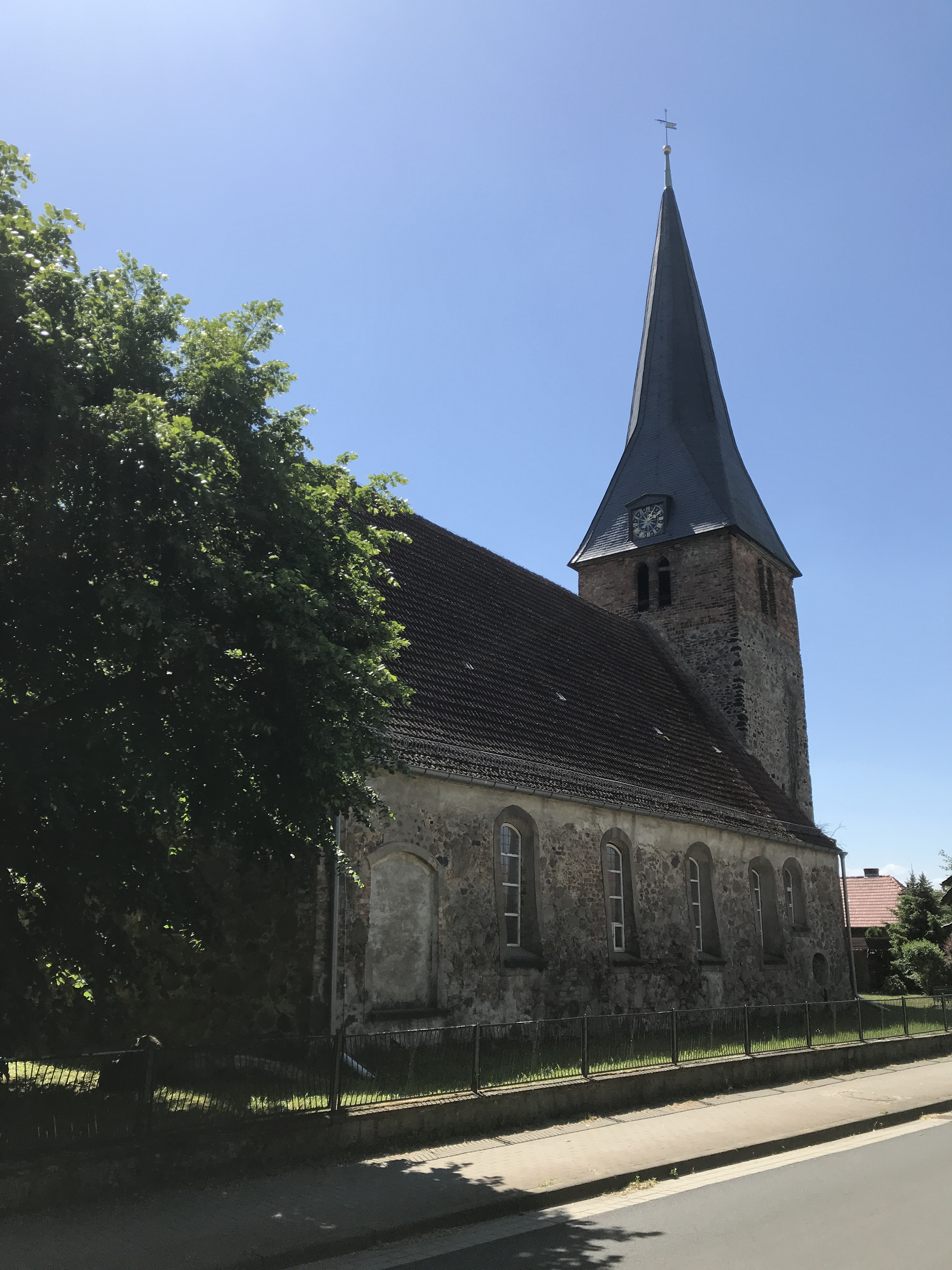 Die Dorfkirche in Kasel-Golzig wurde im 14. Jahrhundert errichtet und im 15. Jahrhundert um den Dachturm erweitert. 1722 erfolgte ein barocker Umbau.